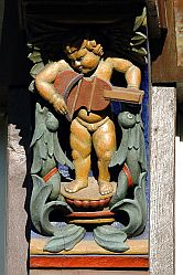 Schlüsselfidel on the Knochenhauerhaus in Hildesheim, Germany